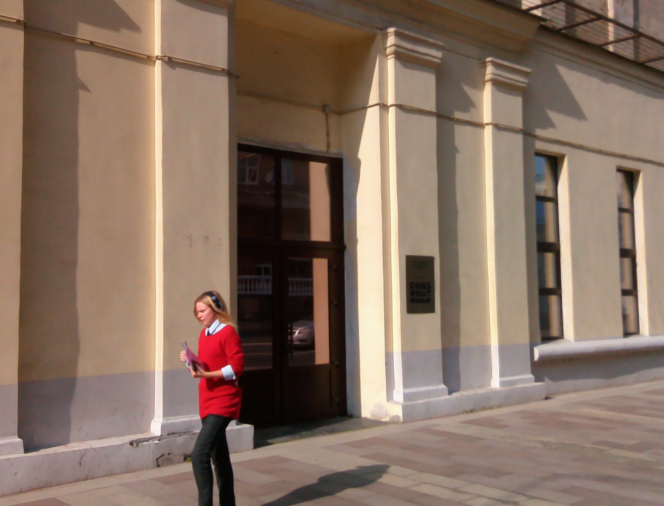 Союзмультфильм (Долгоруковская, 25)